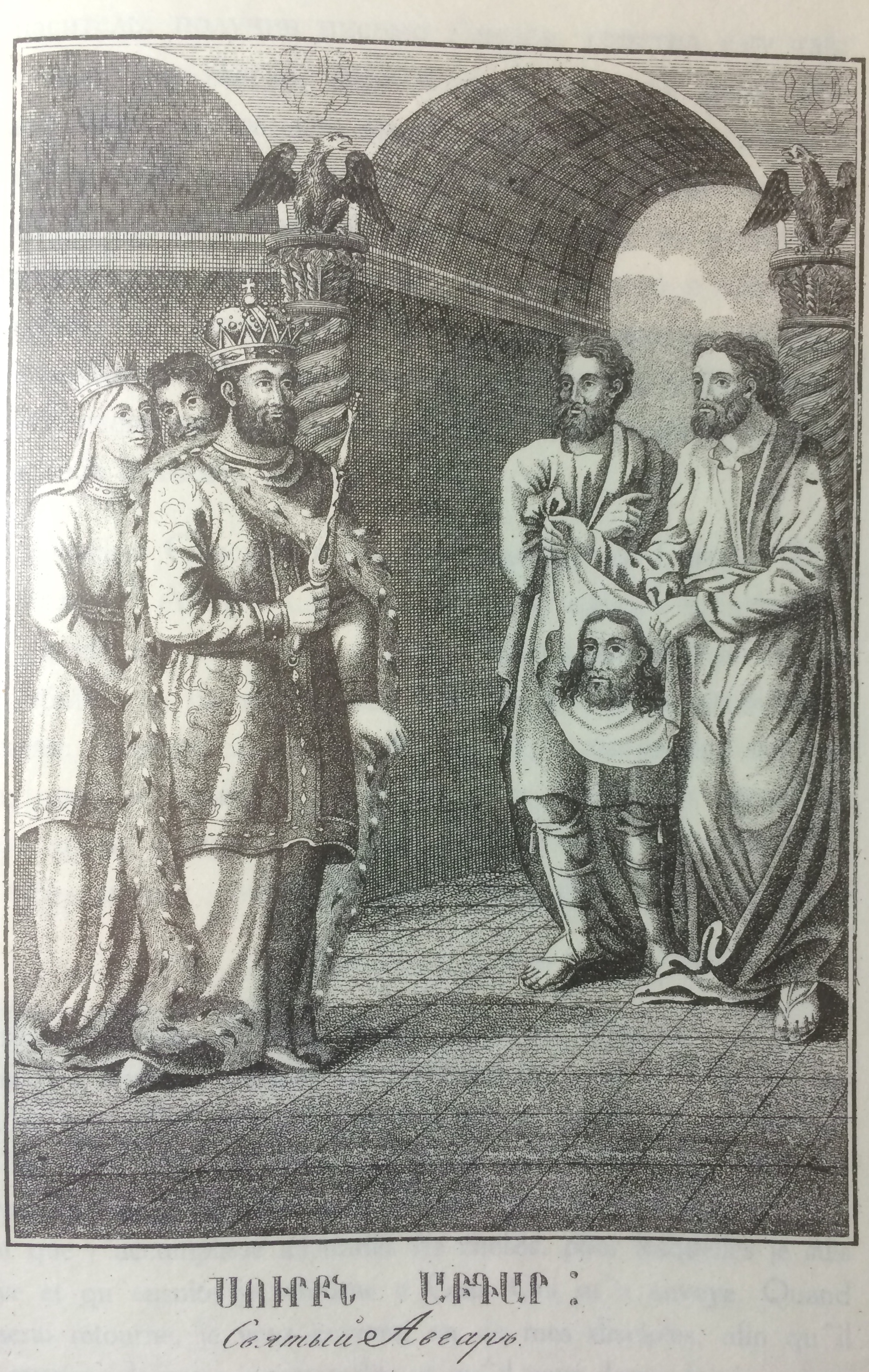 Աբագր Ե թագավորը